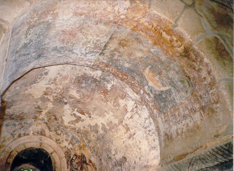 Pinturas murais da igrexa de Santa Comba de Bande